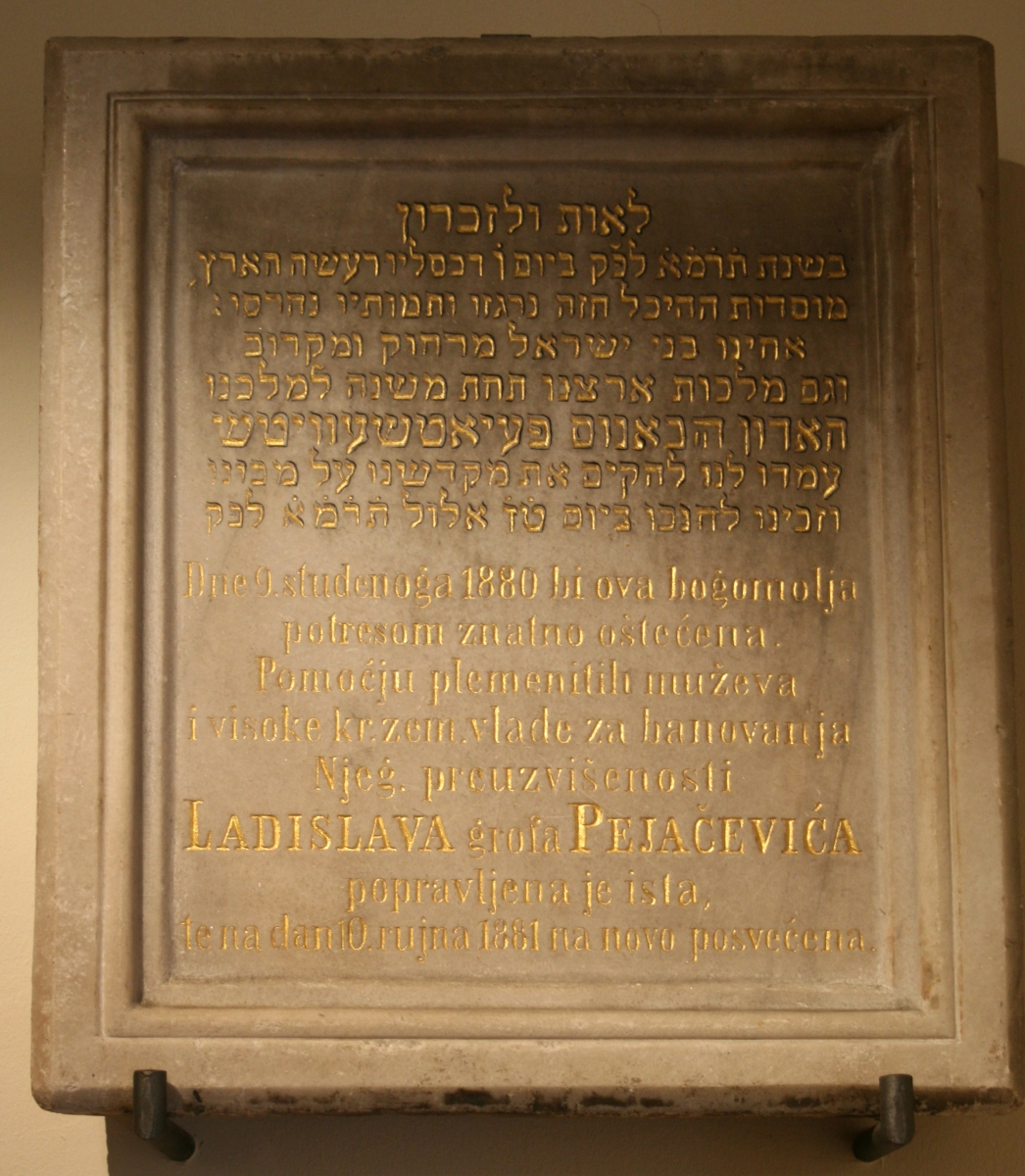 spomen ploča iz sinagoge, Zagreb, 1867. g., u Muzeju grada Zagreba